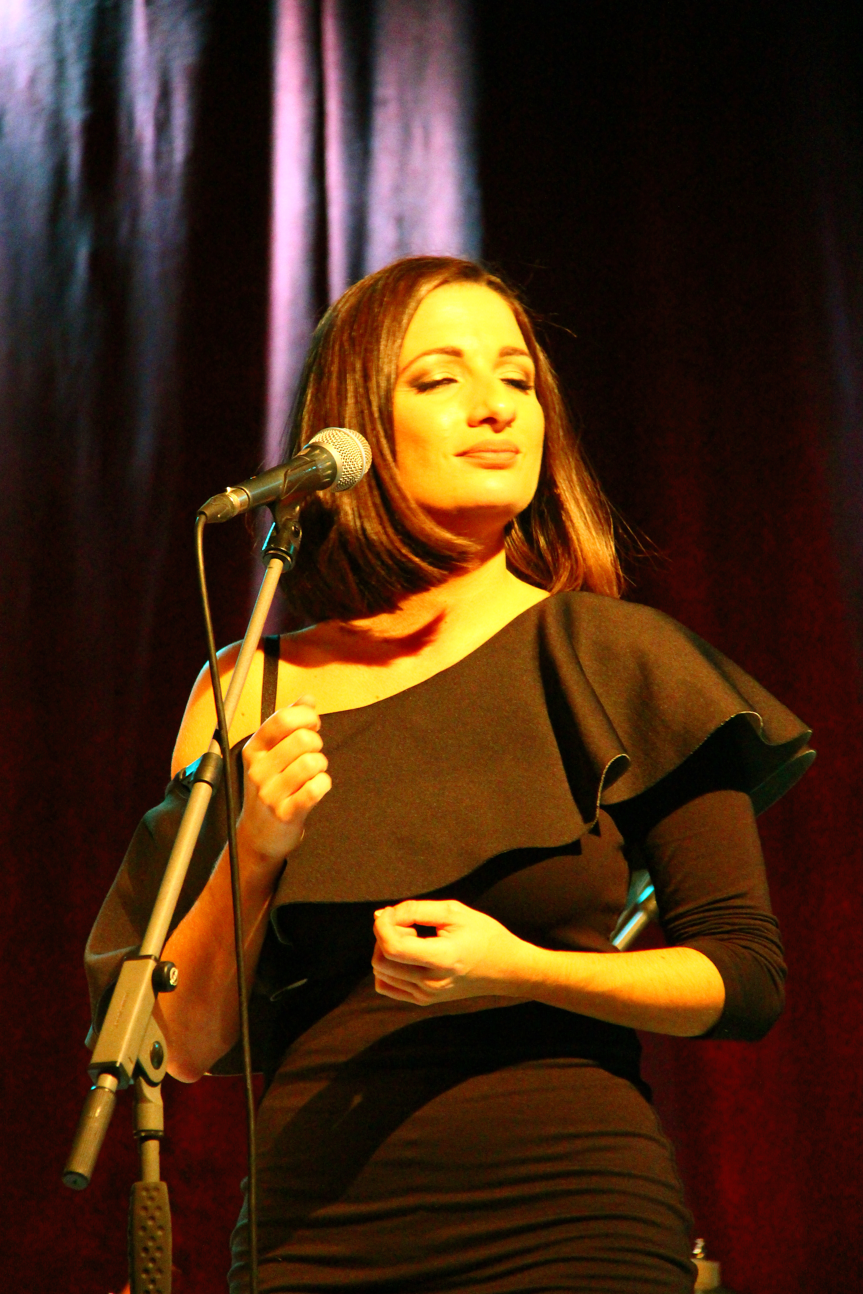 Andrea Zimányiová & Band vo Vrábľoch (10.12.2017, kino Tatra, Vráble)